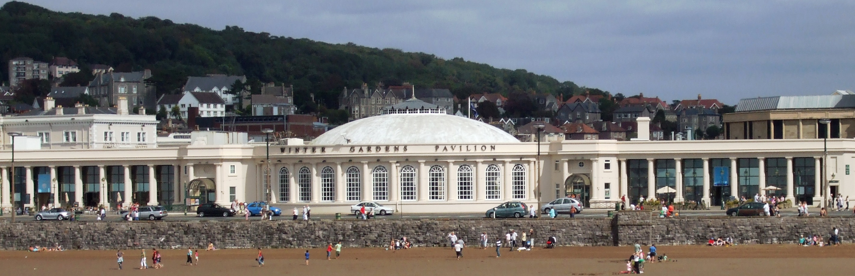 Winter Gardens Weston super Mare